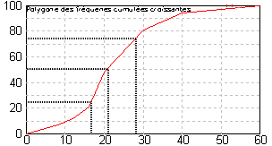 Lecture des quartiles sur le polygone des fréquences cumulées. Image personnelle créée avec gnuplot et gimp.